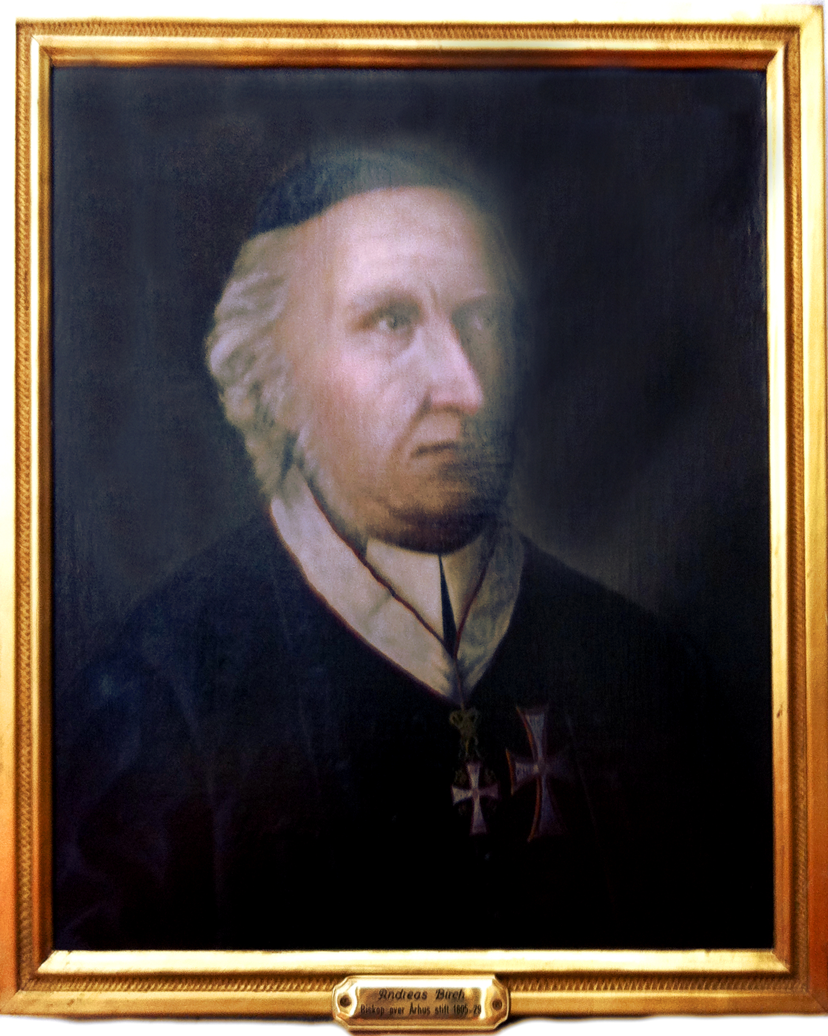 Andreas Birch, biskop over Lolland-Falster stift og Aarhus stift.